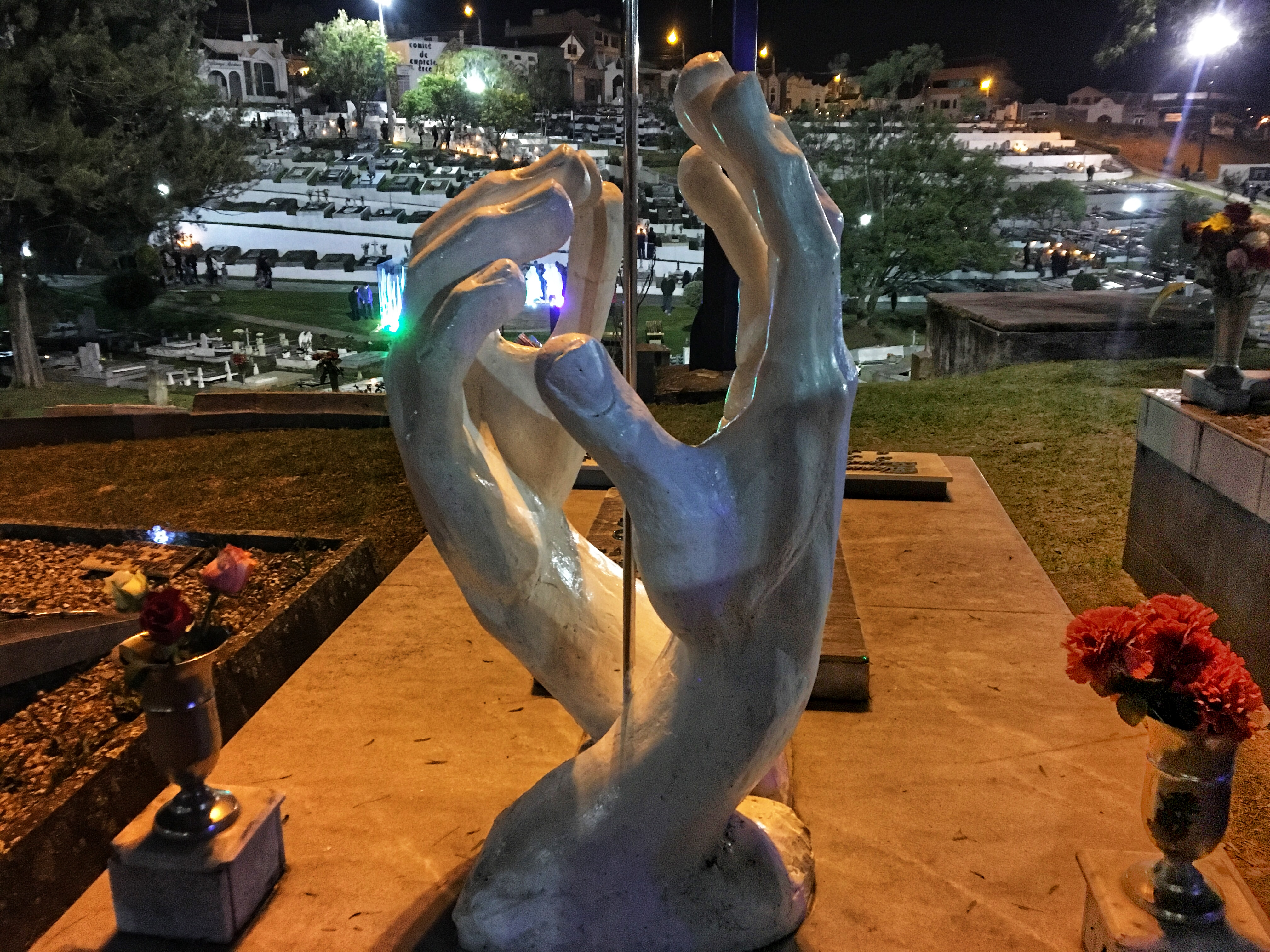 Cuenca, Ecuador, November 2018